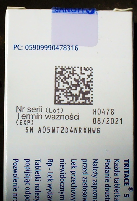 Pokazano wygląd rzeczywistego opakowania, które ma naklejkę ATD, Oznaczenie GTIN, Kod DataMatrix z kodem korekcyjnym ECC 200, numer serii, termin wazności i zrandomizowany numer seryjny opakowania. Kod DataMatrix może podawać te same informacje w innej kolejności, ale formacie zgodnym ze specyfikacją GS1.